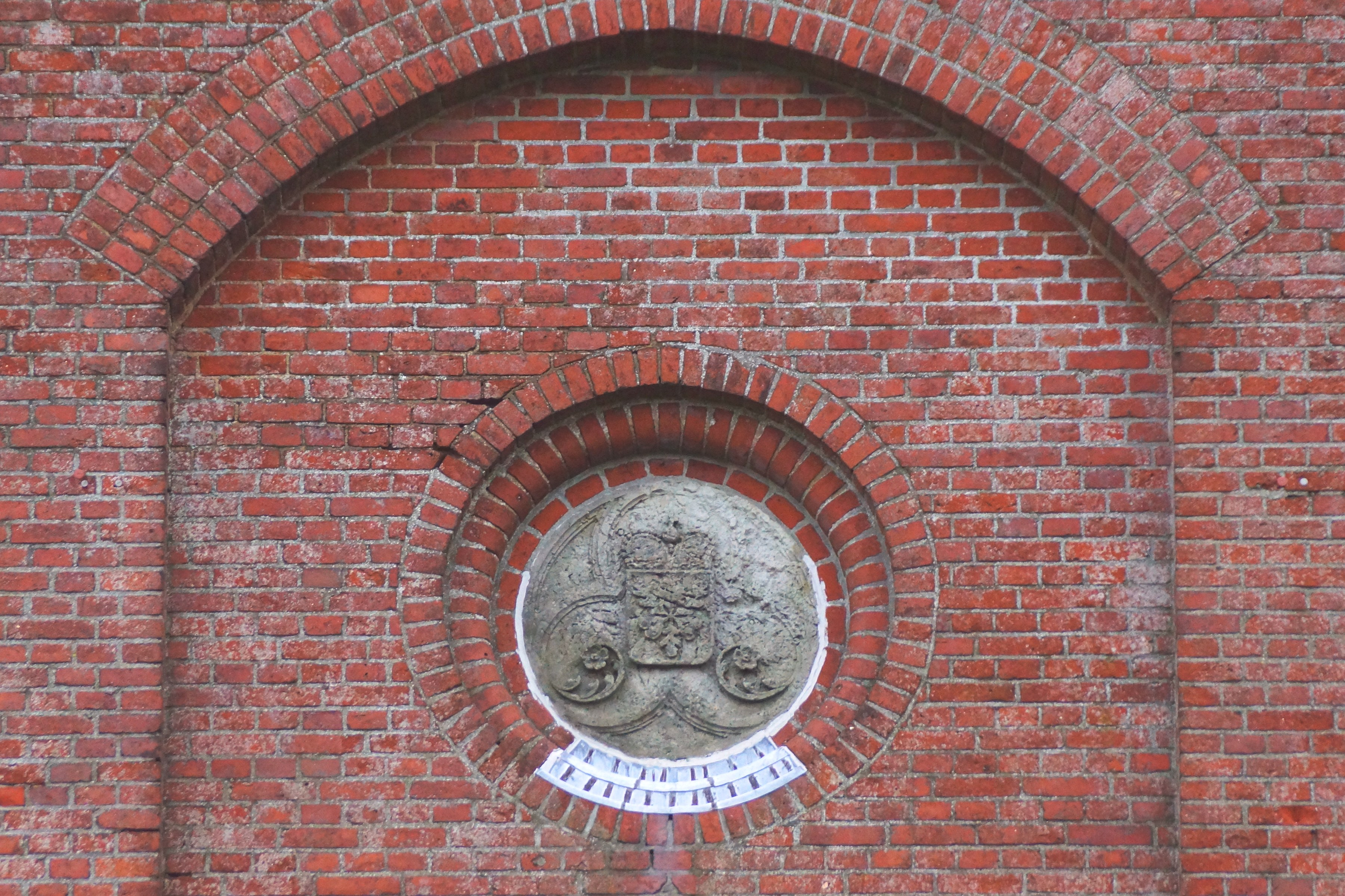 Rosette als Steinmetzarbeit im oberen Mauerwerksbogen mit stilisiertem Wappen am Bismarckturm Steinbergkirche-Scheersberg, früher Groß-Quern Ortsteil Scheersberg Foto Wolfgang Pehlemann DSC00578